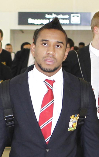 Андерсон Луис де Абреу Оливейра